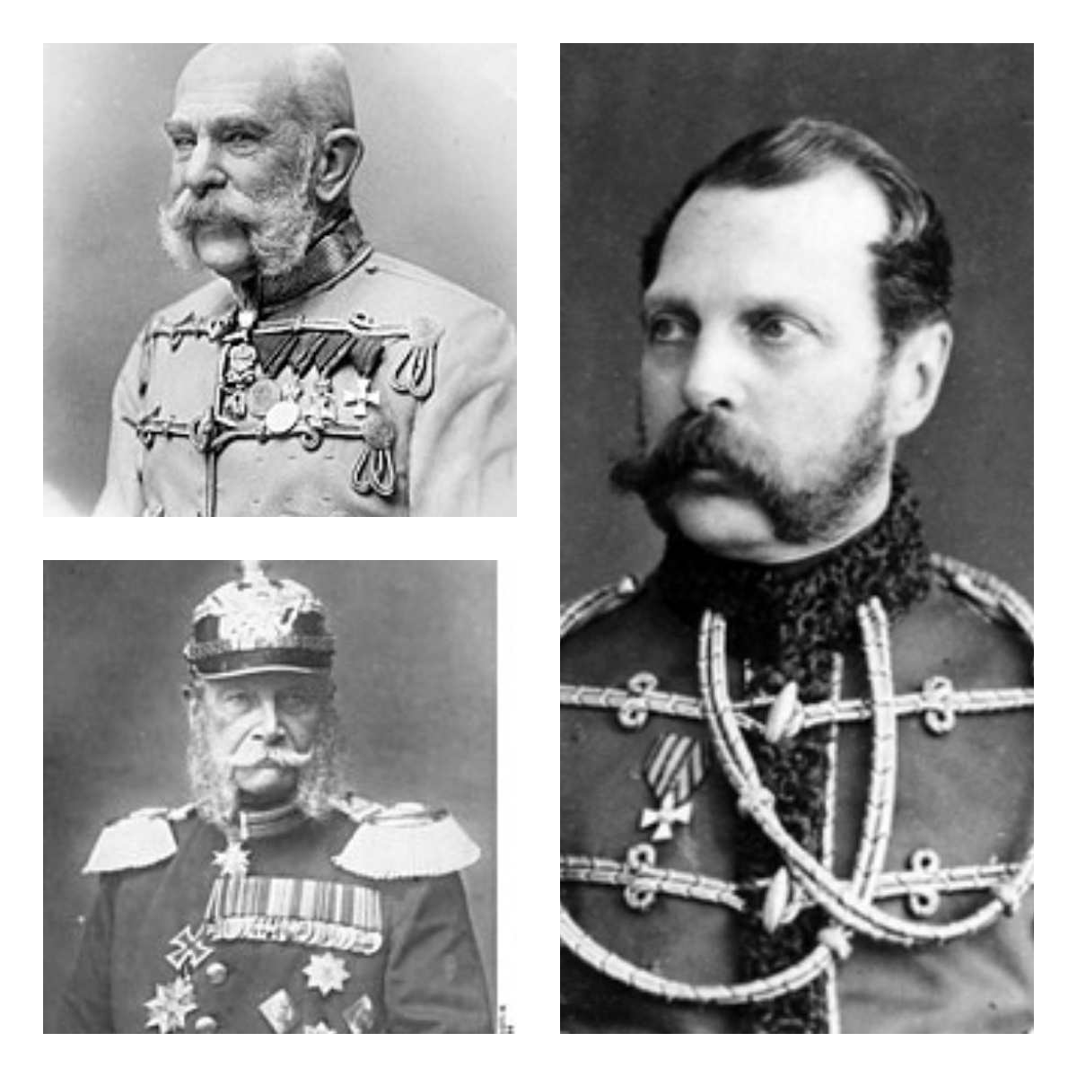 Александр II, Франц Иосиф I (Австро-Венгрия), кайзер Вильгельм I (Германия) (Справа - налево - вниз)